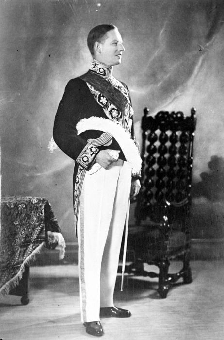 Repronegatief. Portret van Gouverneur-Generaal Tjarda van Starkenborgh Stachouwer